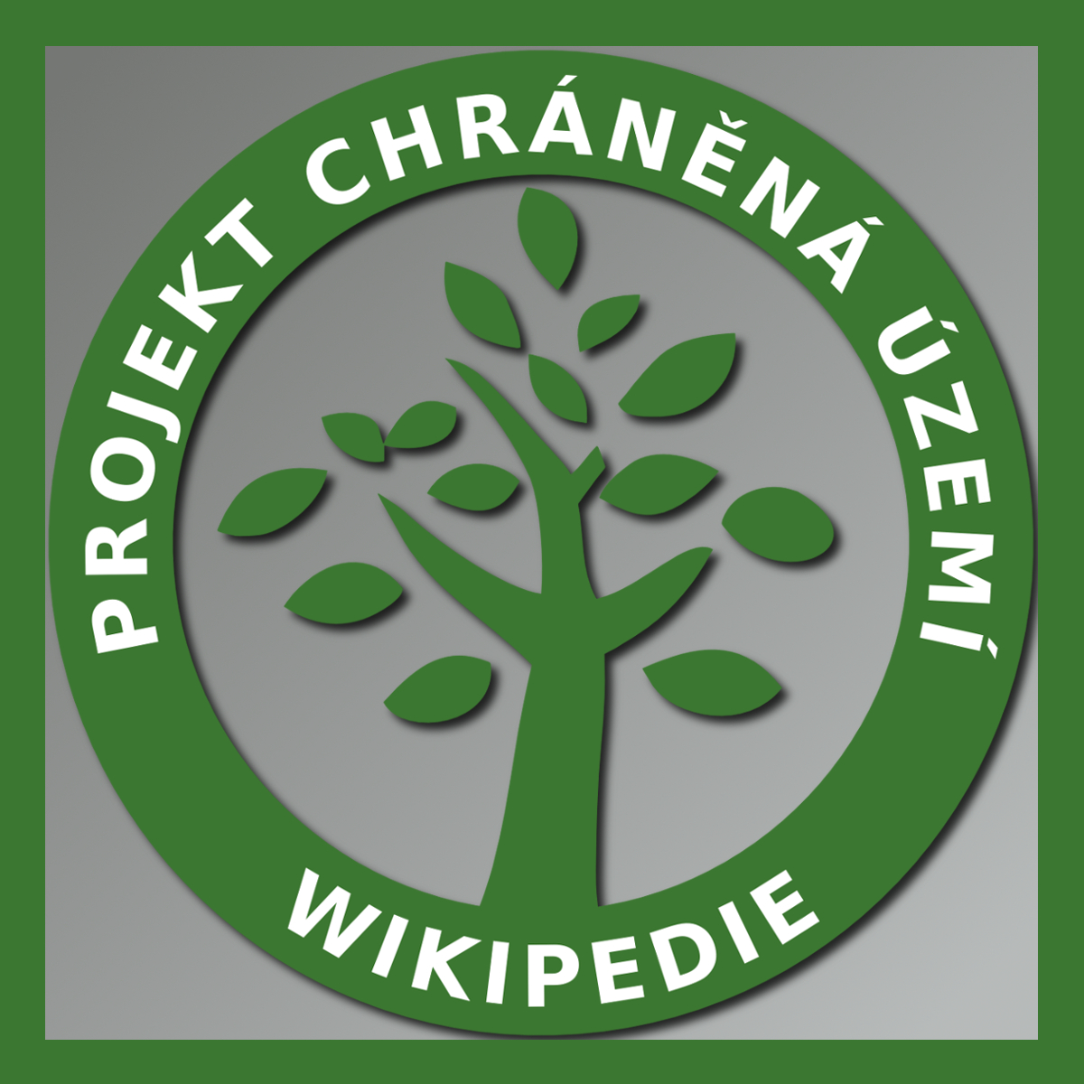 Zadní strana pro Pexeso v rámci Wikiprojektu Chráněná území